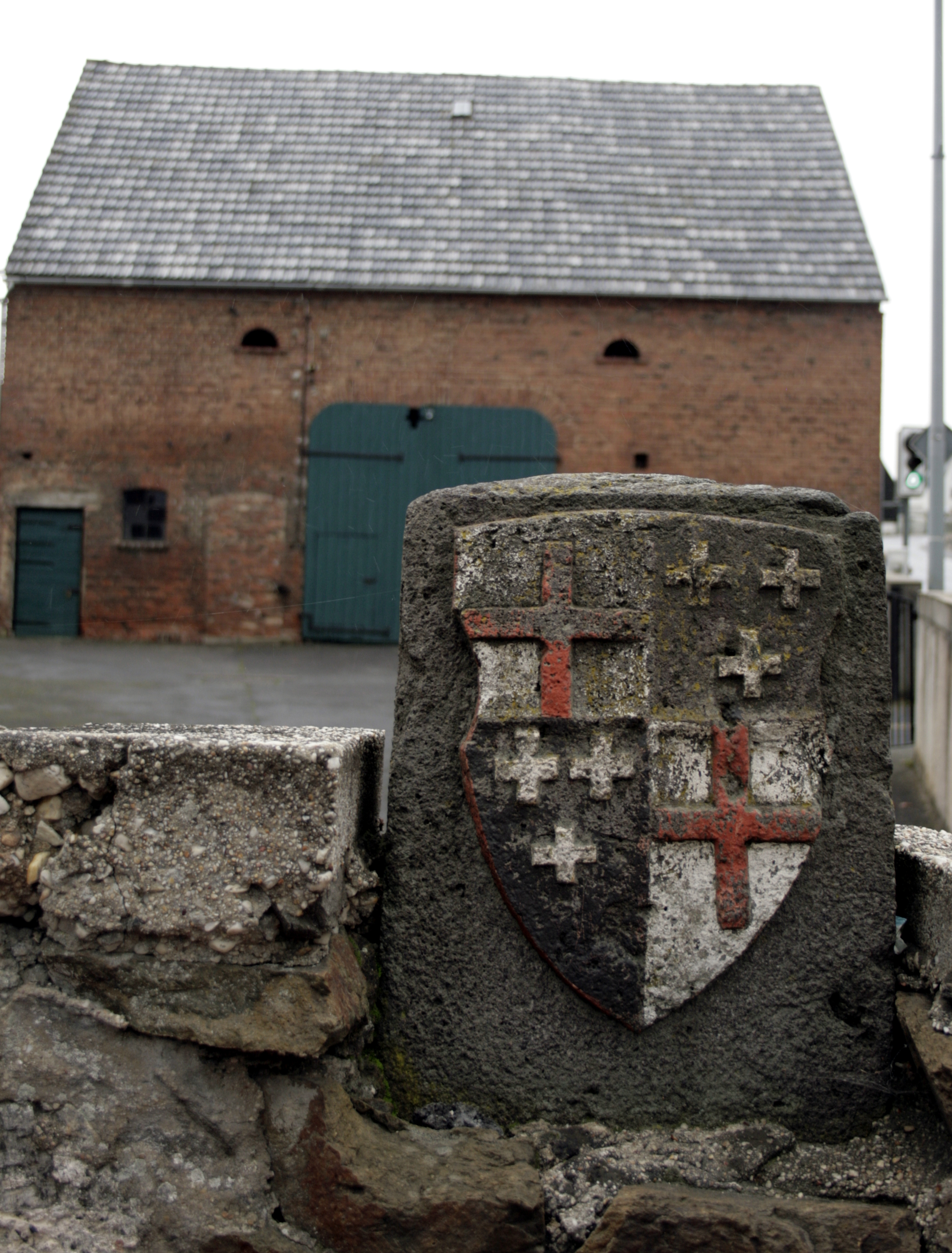 Grenzstein mit dem Wappen des Trierer Erzbischofs Johann von Schönenberg am "Bausche Haus" in Elz, Deutschland